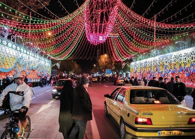 جشن نیمه شعبان در تبریز